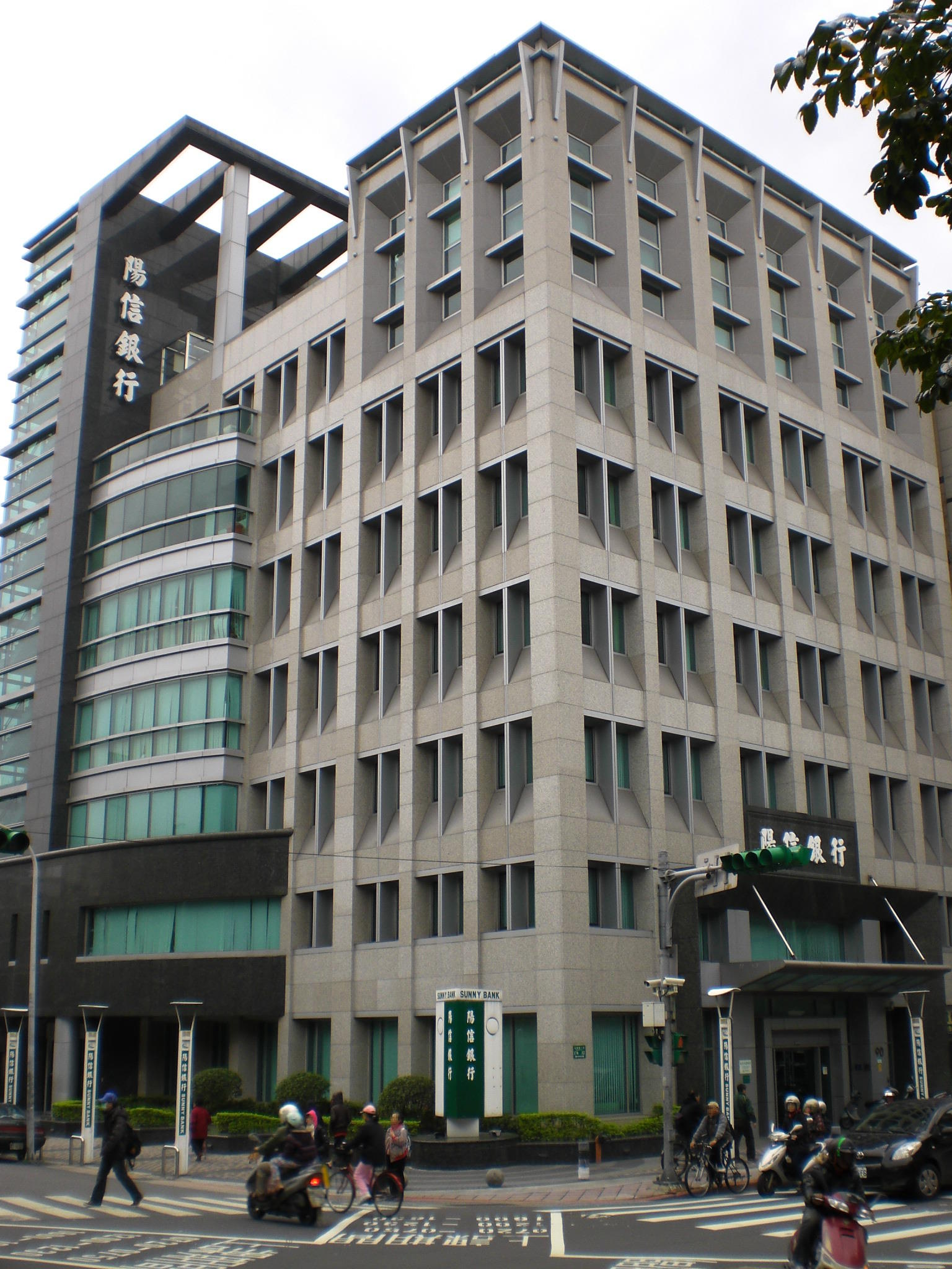 陽信商業銀行石牌分行，位於臺北市北投區石牌路一段90號。